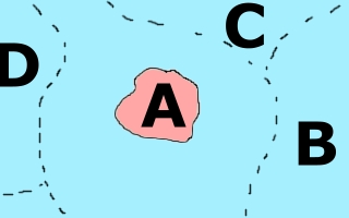 Schéma ostrovného štátu Zdroj: nakreslené - Vladimír Tóth Dátum: 17.12.2006 Autor: Ike - Vladimír Tóth Povolenie: PD Iné verzie tohto súboru: Nie